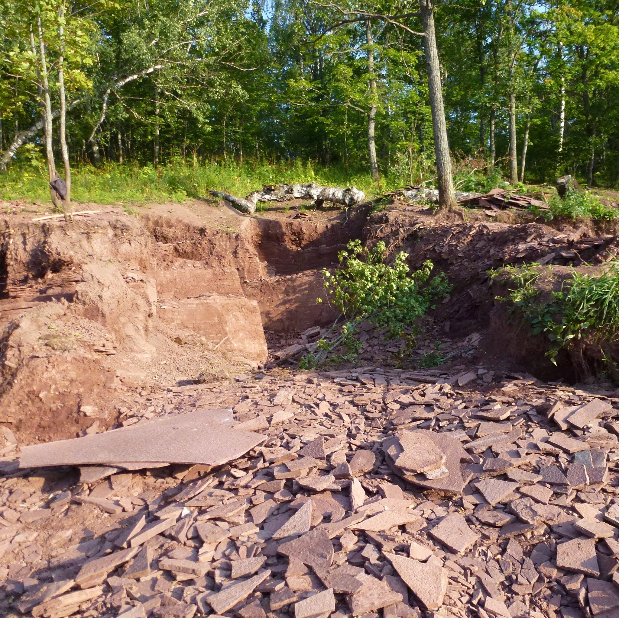 Добыча сланцев, Бедярыш, Челябинская область